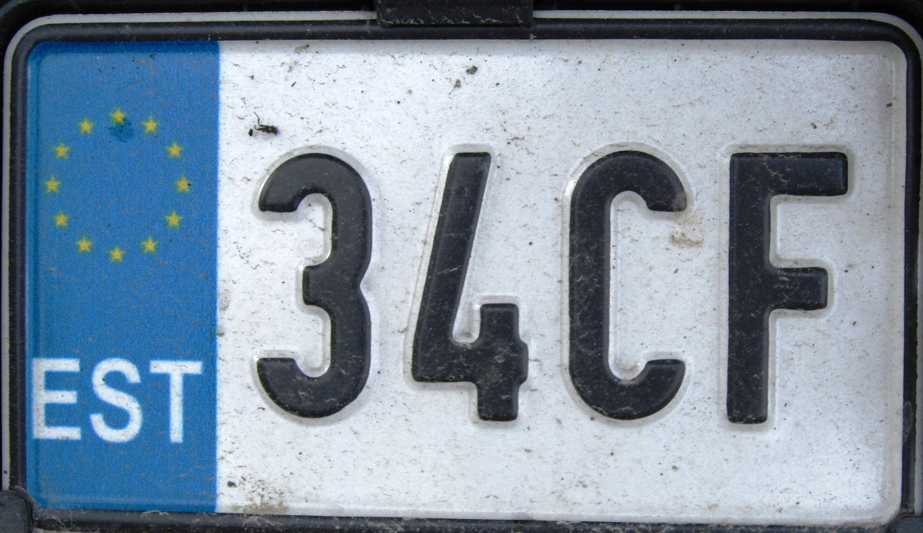 Estland kenteken motor